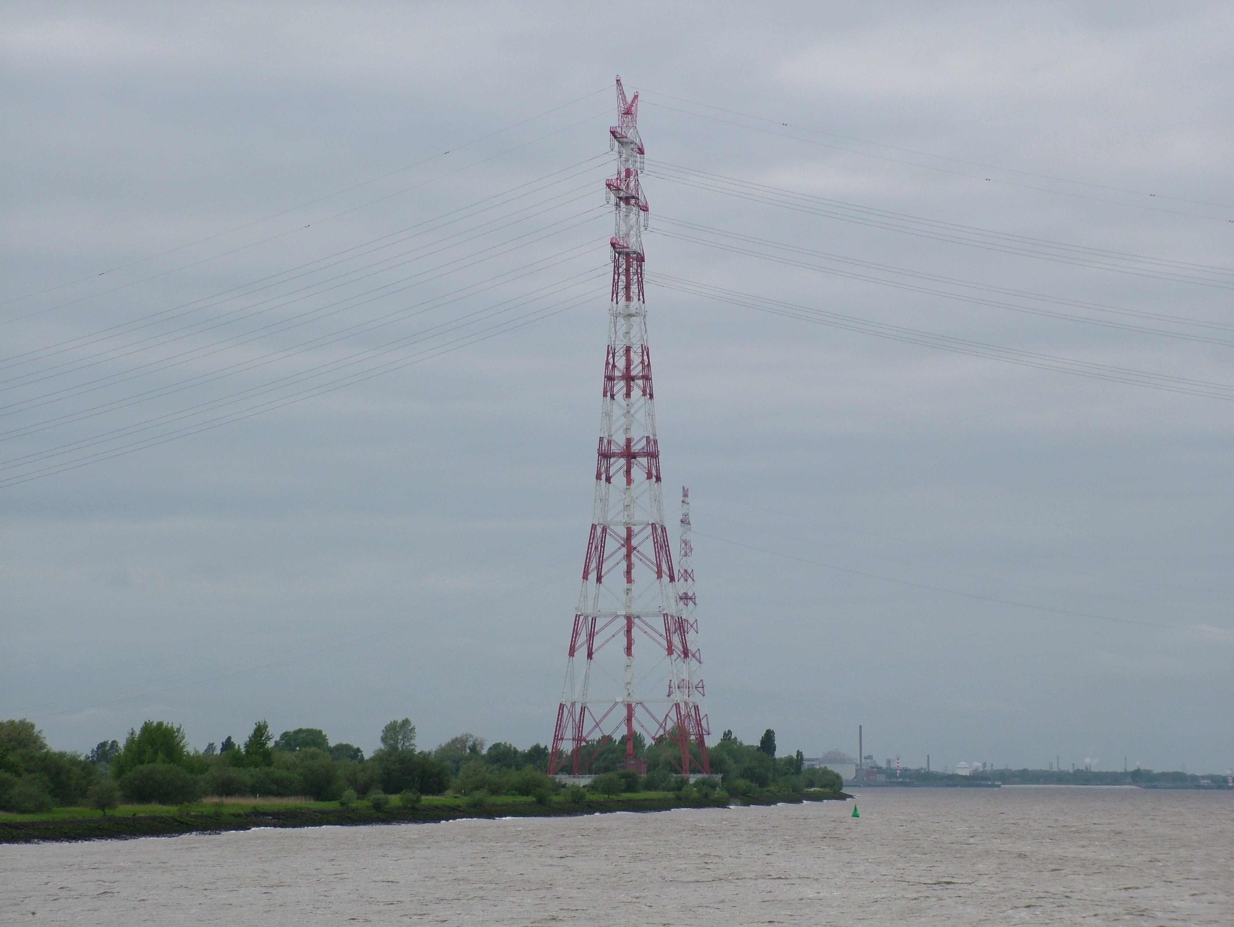 Tragmast der Elbekreuzung 2 auf Lühesand, dahinter Elbekreuzung 1